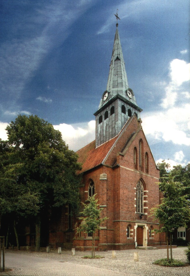 Ansicht des Haupteinganges der Pfarrkirche St. Georg in Ottenstein